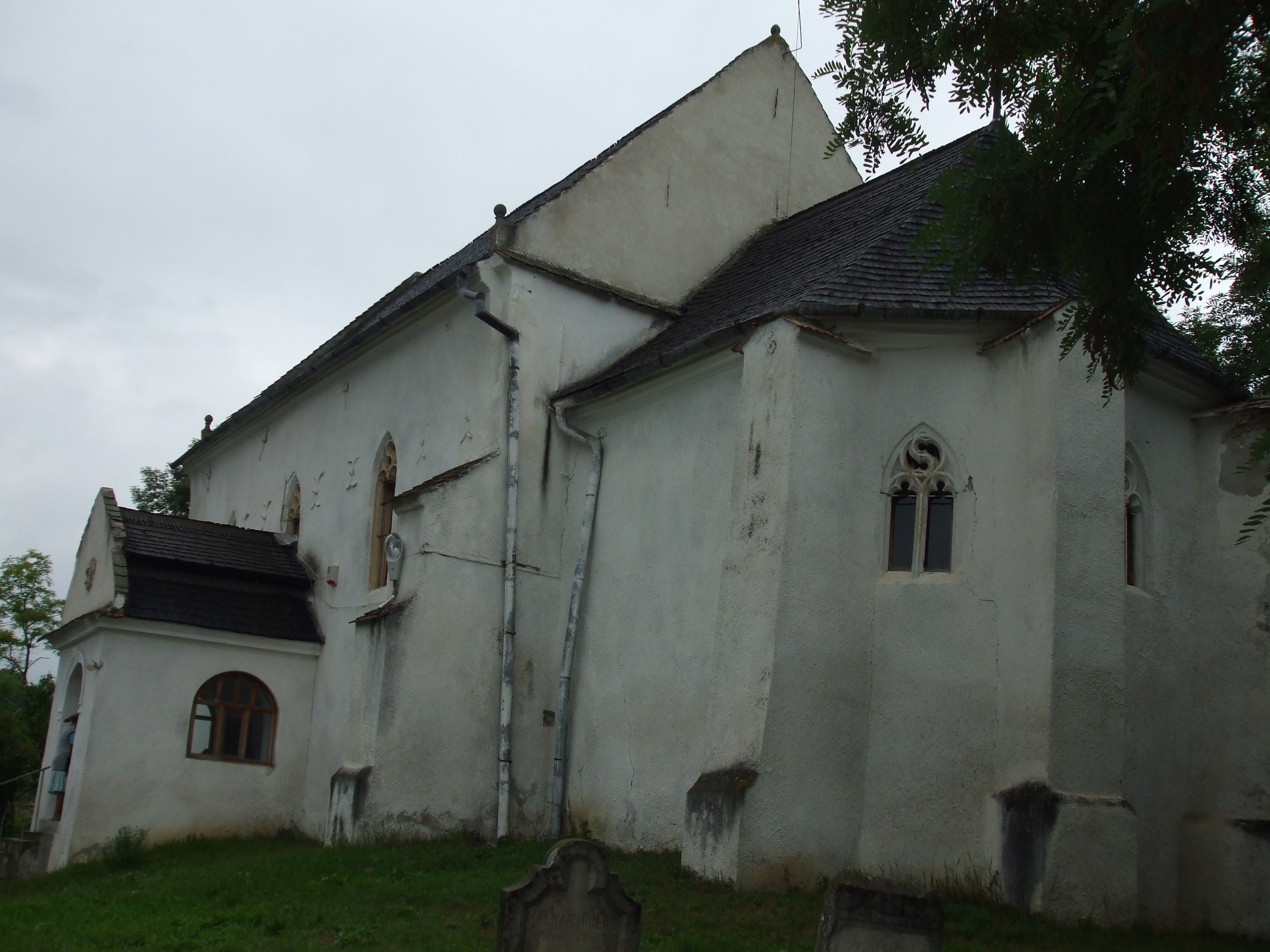 Biserica unitariana din Suatu, sec.XIII, monument istoric, vedere dinspre est.